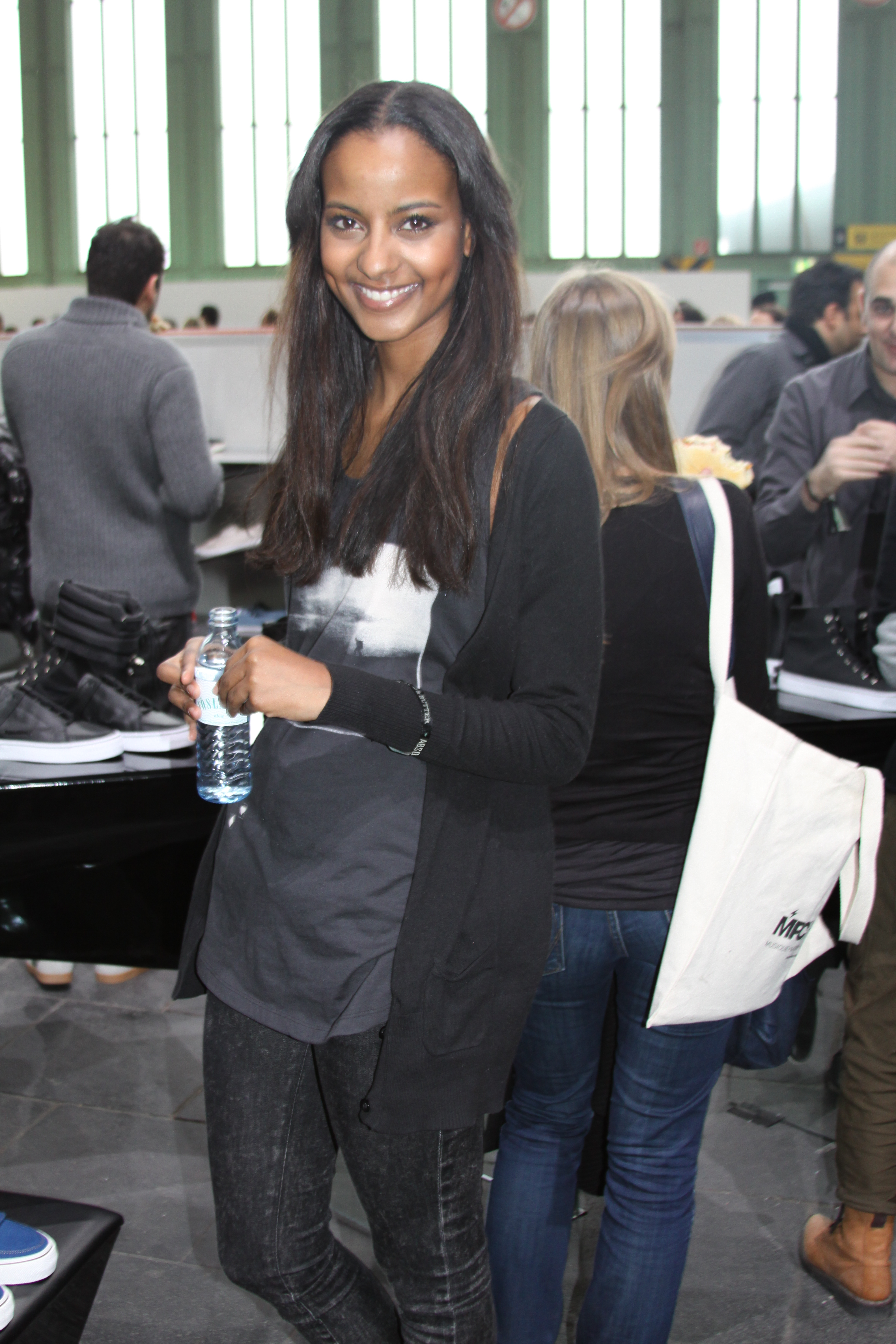 Sara Nuru auf der Bread-&-Butter-Messe in Berlin am 19.1.2011.